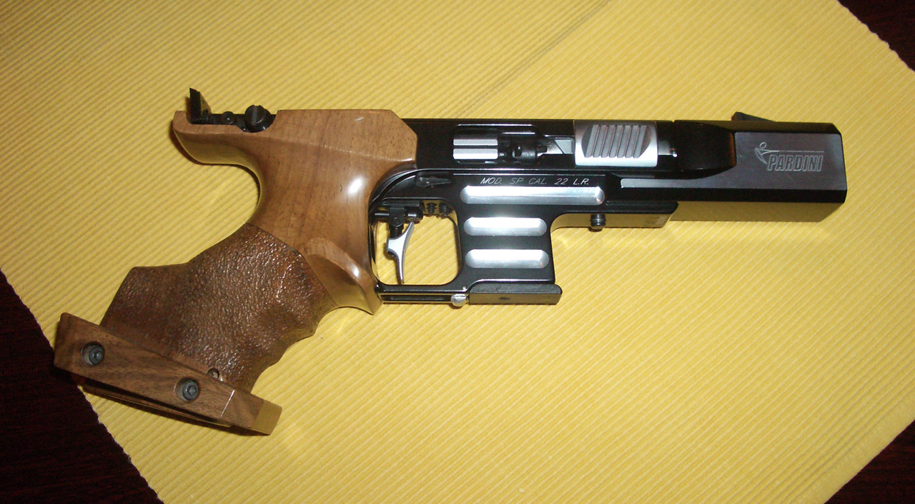 pistolet Pardini SP